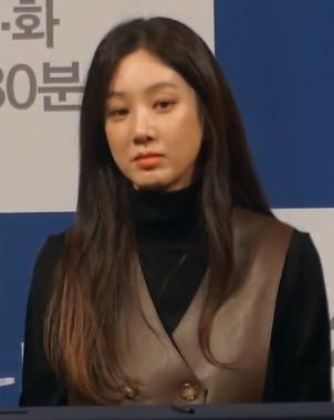 16일 오후 서울시 강남구 논현동 임피리얼팰리스서울 호텔에서 JTBC 새 월화드라마 '검사내전' 제작발표회가 열려 배우 이선균X정려원X이성재X김광규X이상희X전성우가 참석해 기자 질의 응답을 하고 있다.